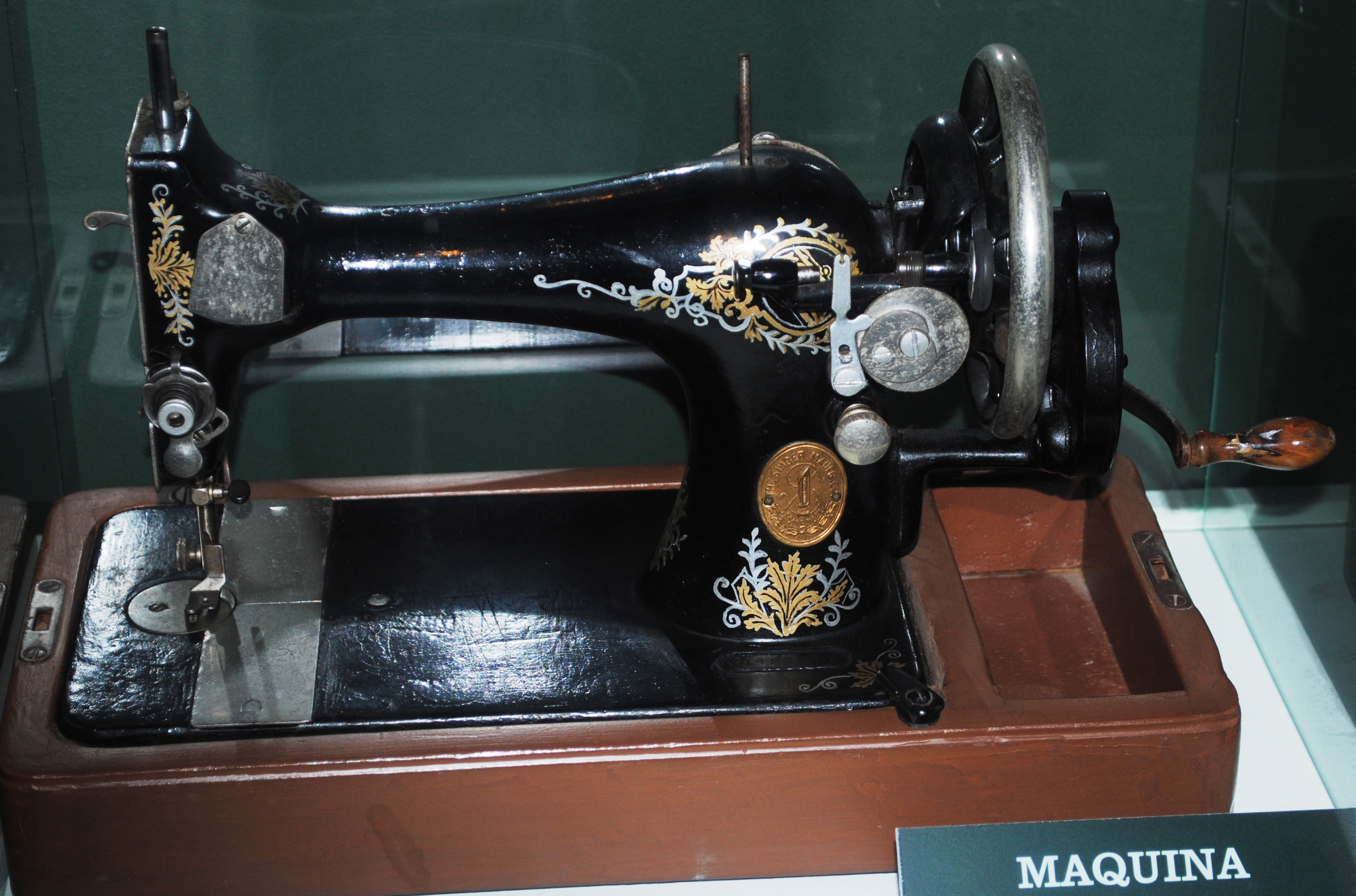 véxase o título e as categorías